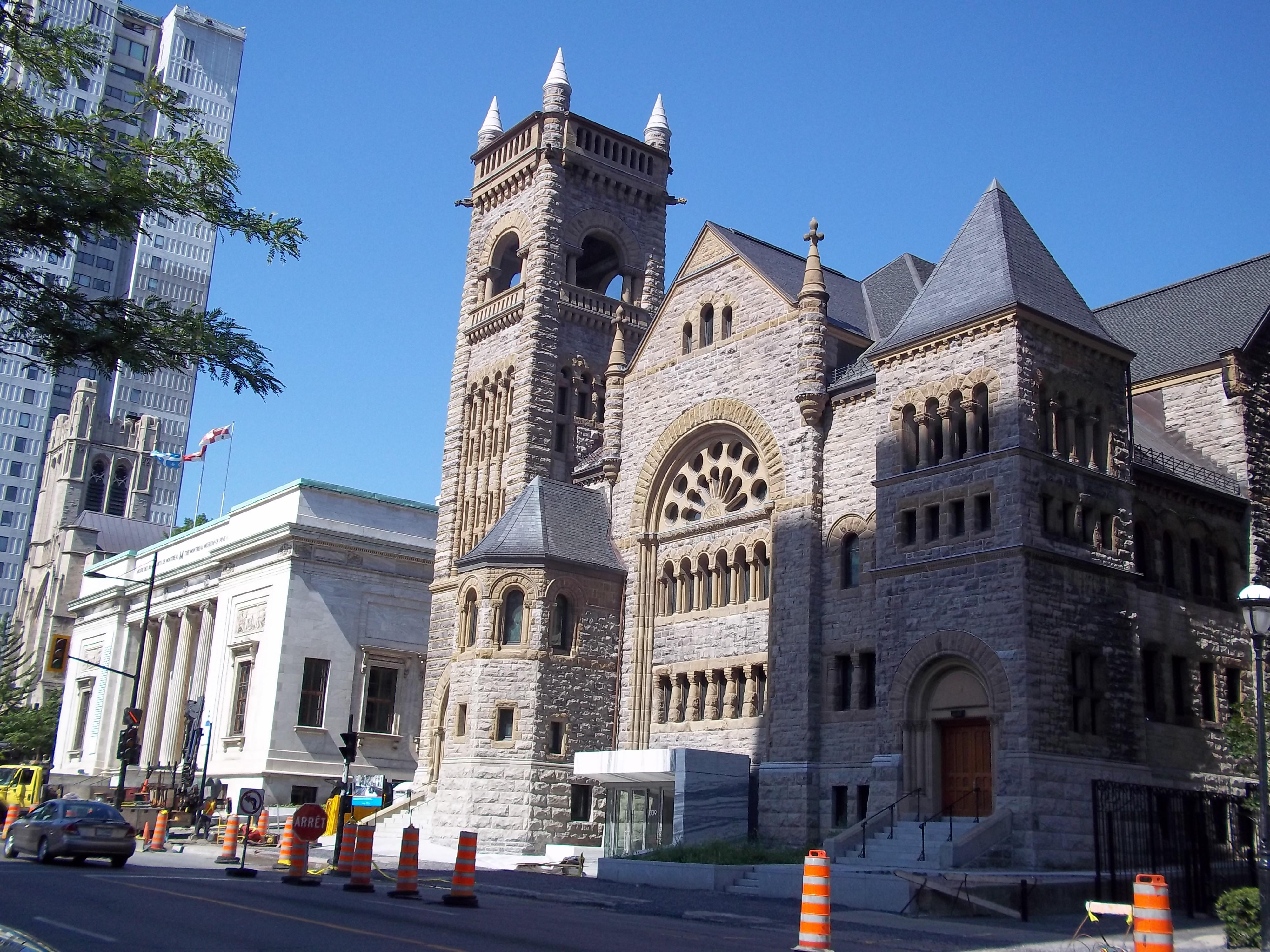 Eglise Erskine and American